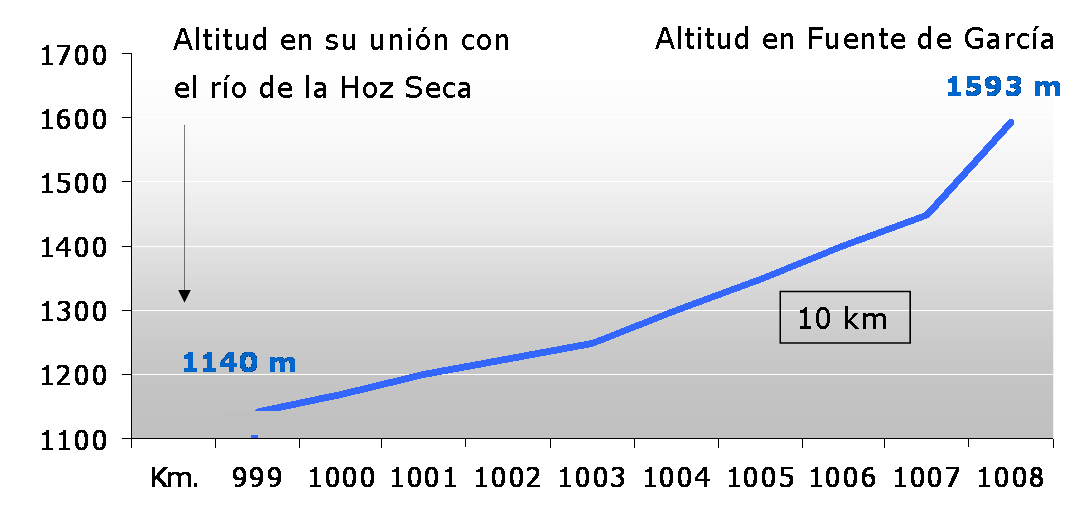 Perfil del río Tajo en sus primeros 10 kilómetros